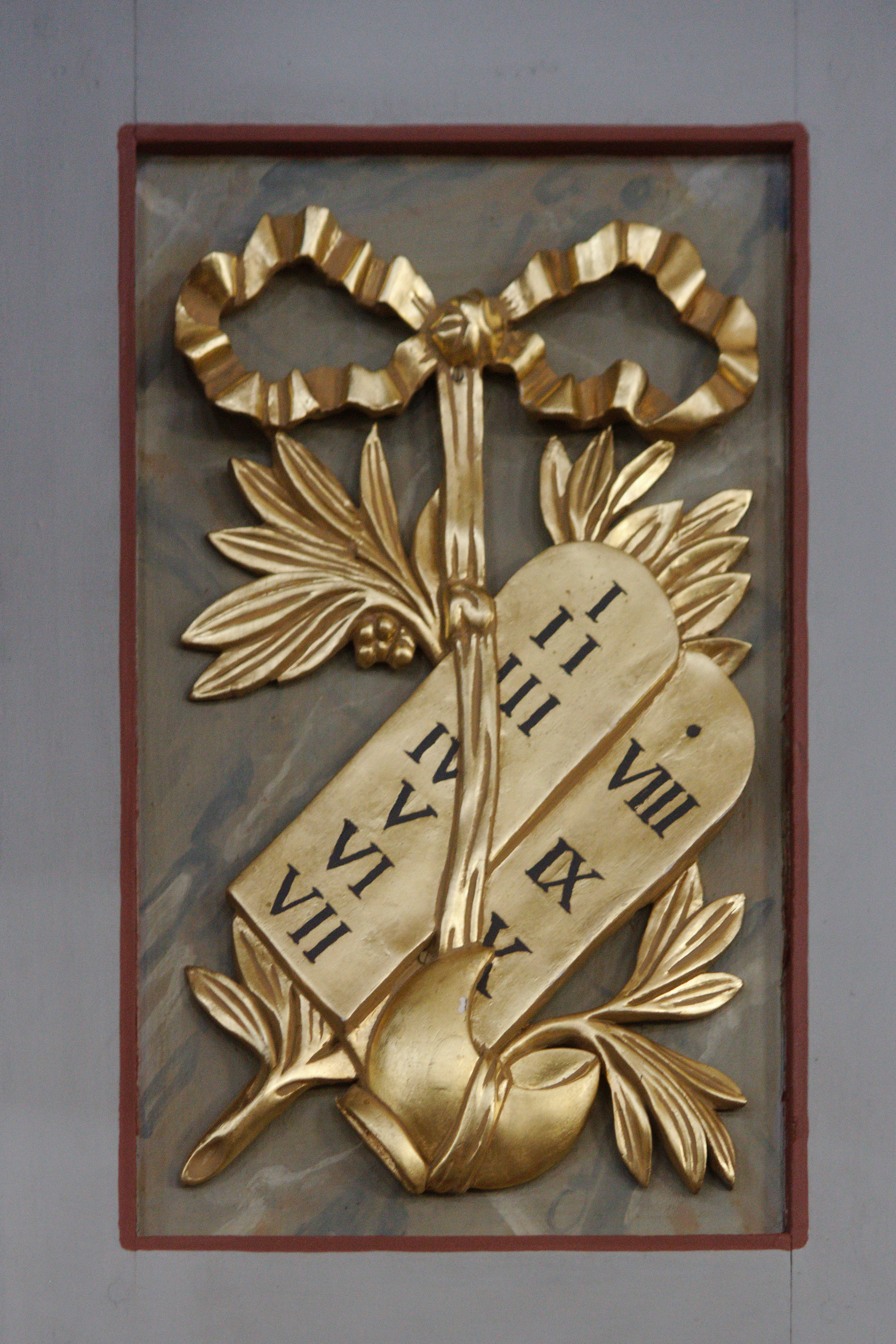 Symbol der zehn Gebote an der Kanzel der evangelischen Kirche in Dudenhofen, einem Stadtteil von Rodgau (Hessen).